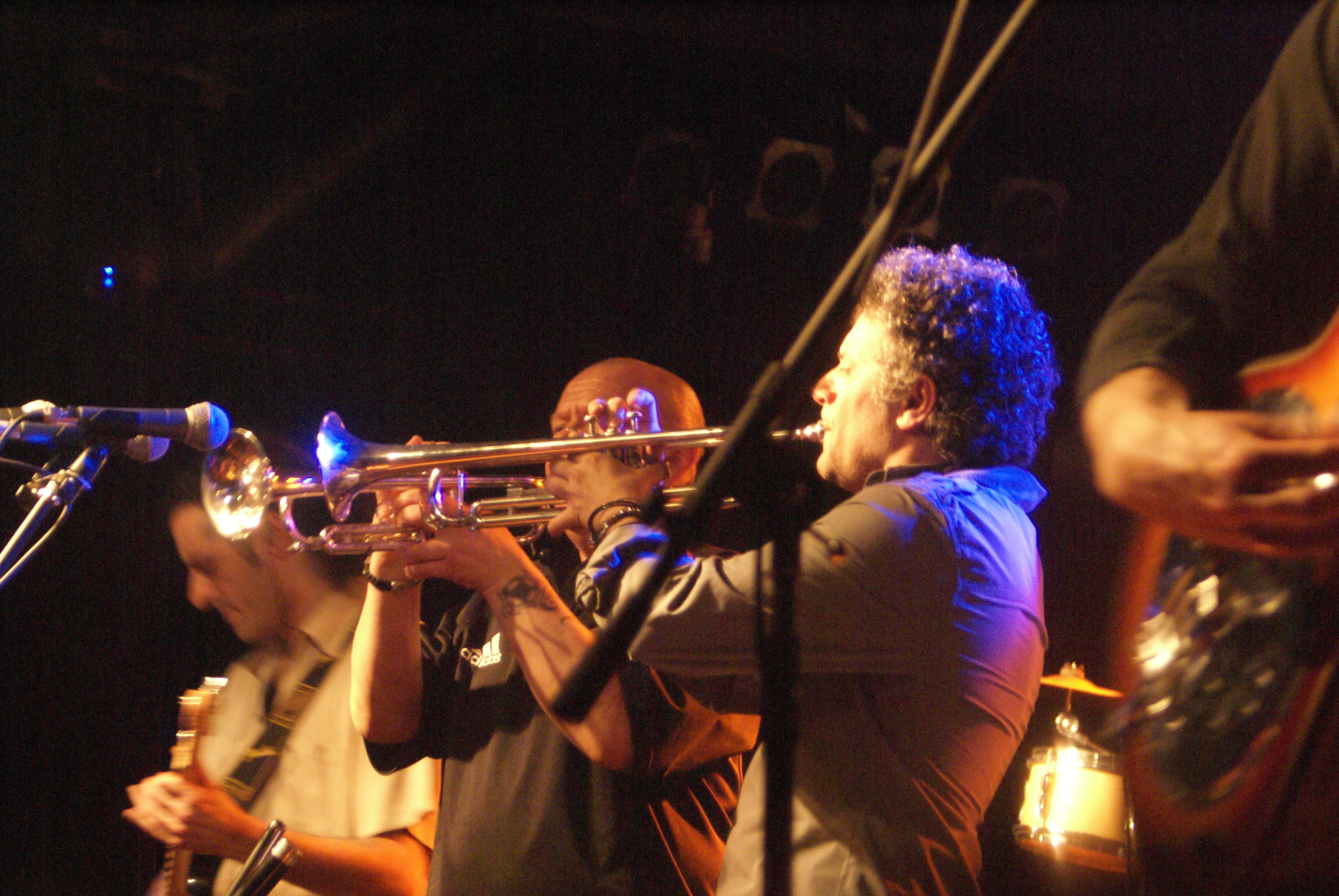 Arcangelo "Kaba" Cavazzuti e Franco D'Aniello live a Roma all'Alpheus